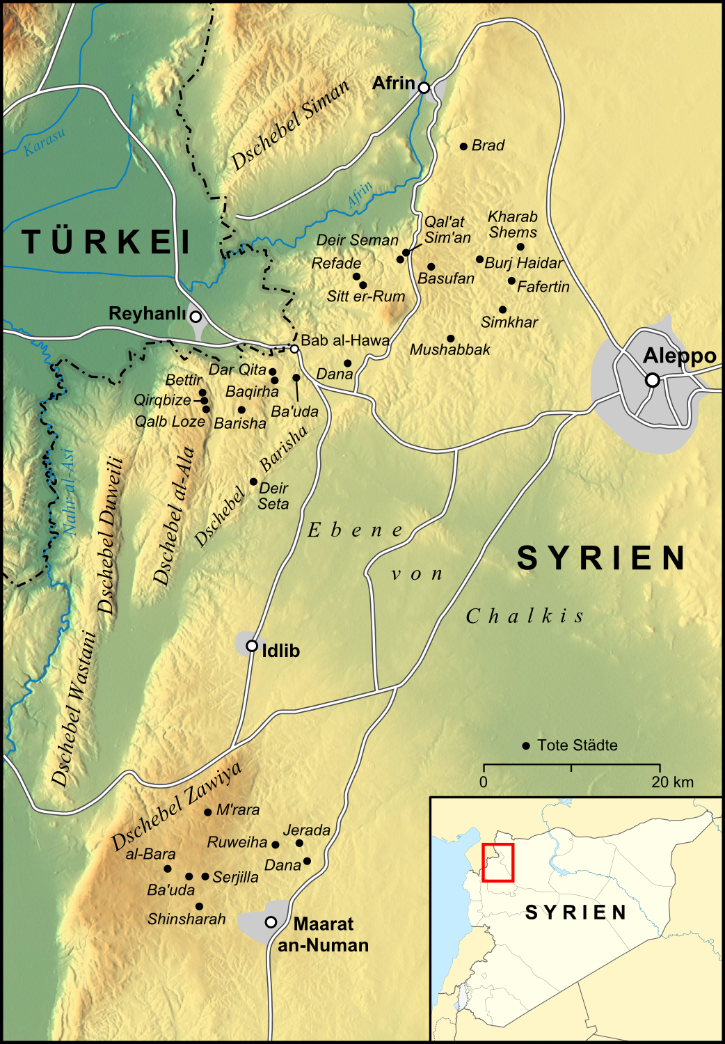 Karte der Toten Städte in Syrien